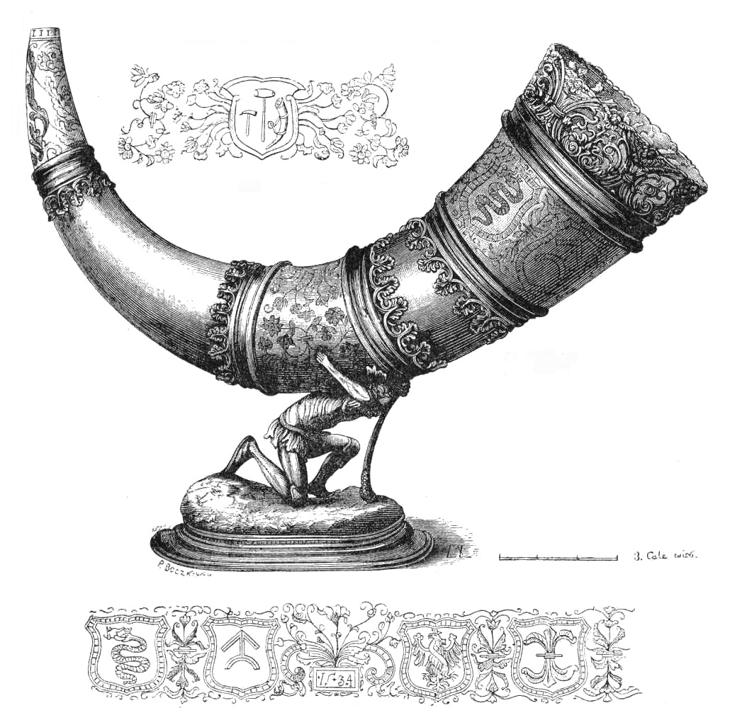 ilustracja